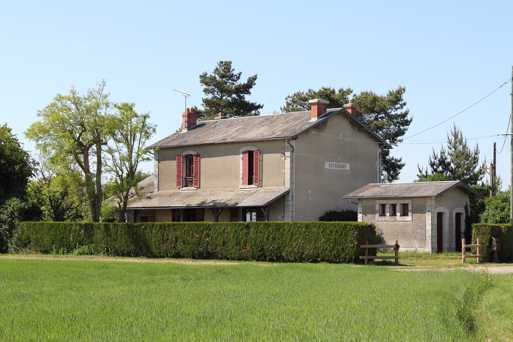 Vue de la gare d'Estouches en juin 2013, Île-de-France, France.